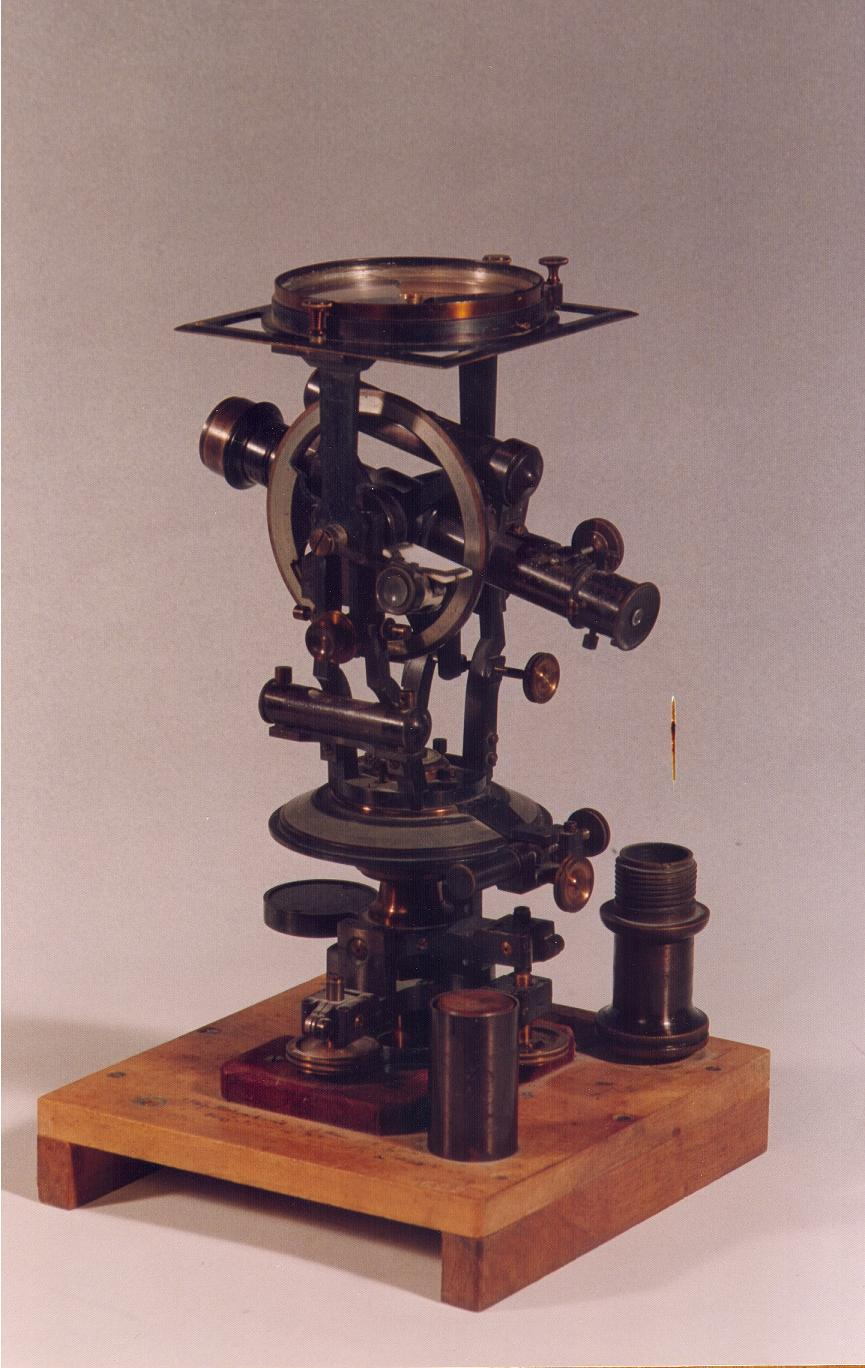 Theodolit - Bestand des DEI Jerusalem, Museum